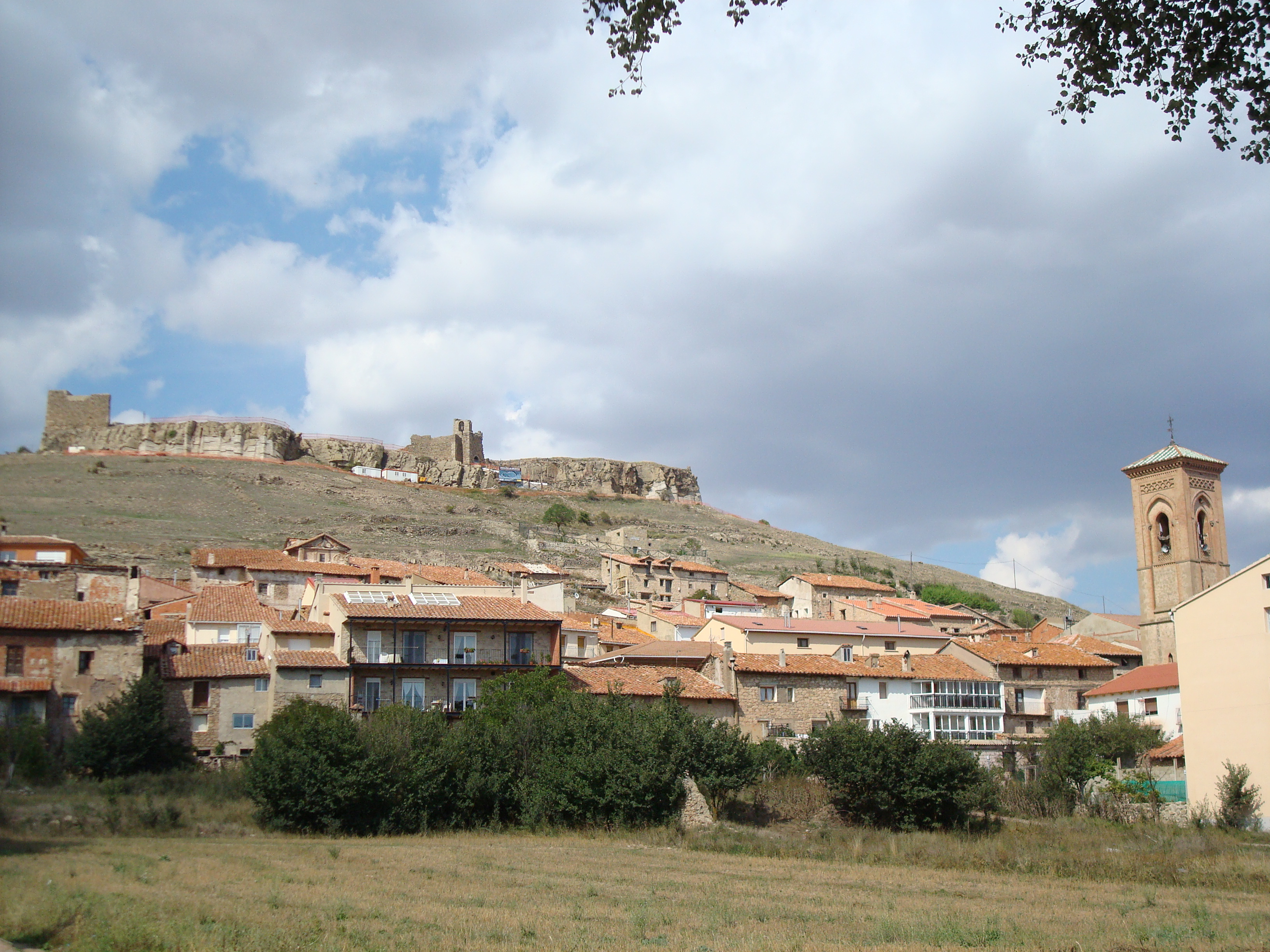 Visió general de la població de Cedrillas (Terol)